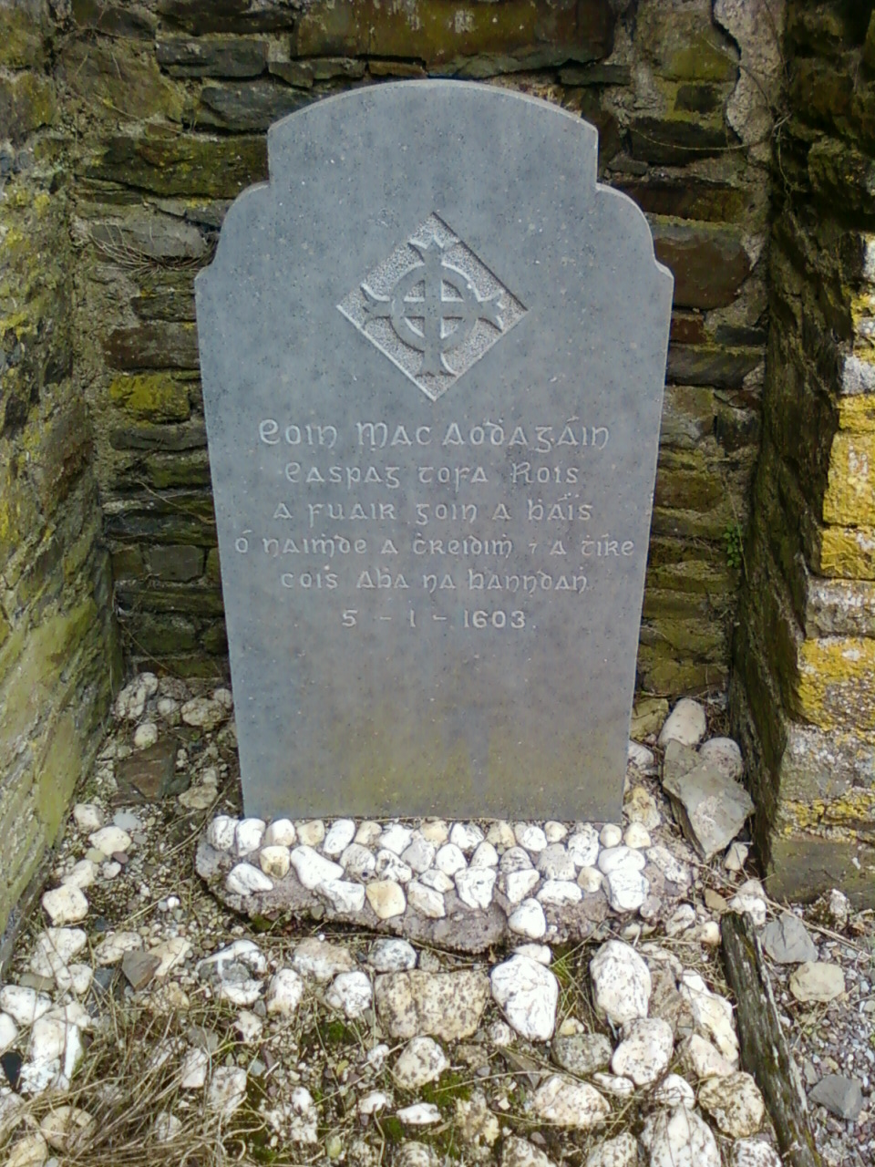 Leac thuama Eoin Mac Aodhagáin, Mainistir Thigh Molaige, Co. Chorcaí, Éire